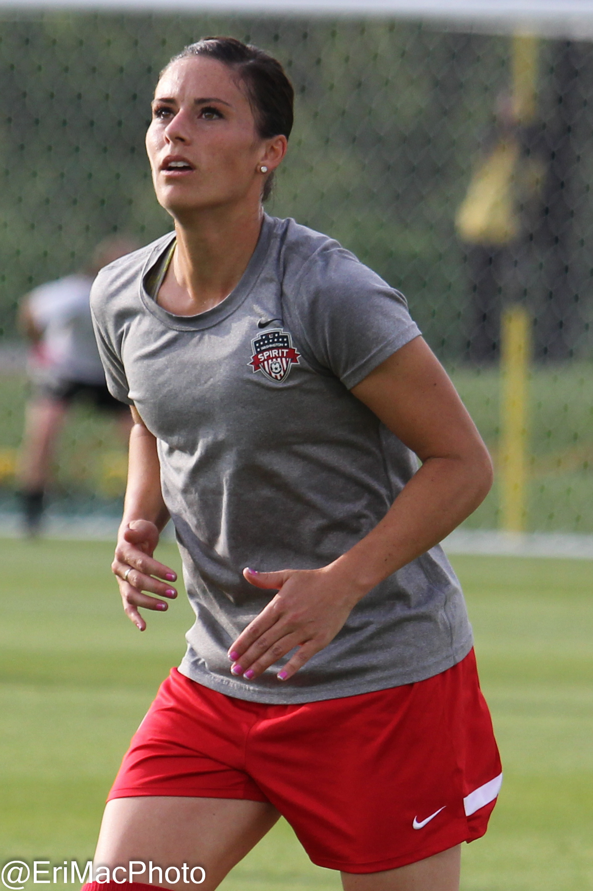 2013-05-11 Spirit - Breakers-14